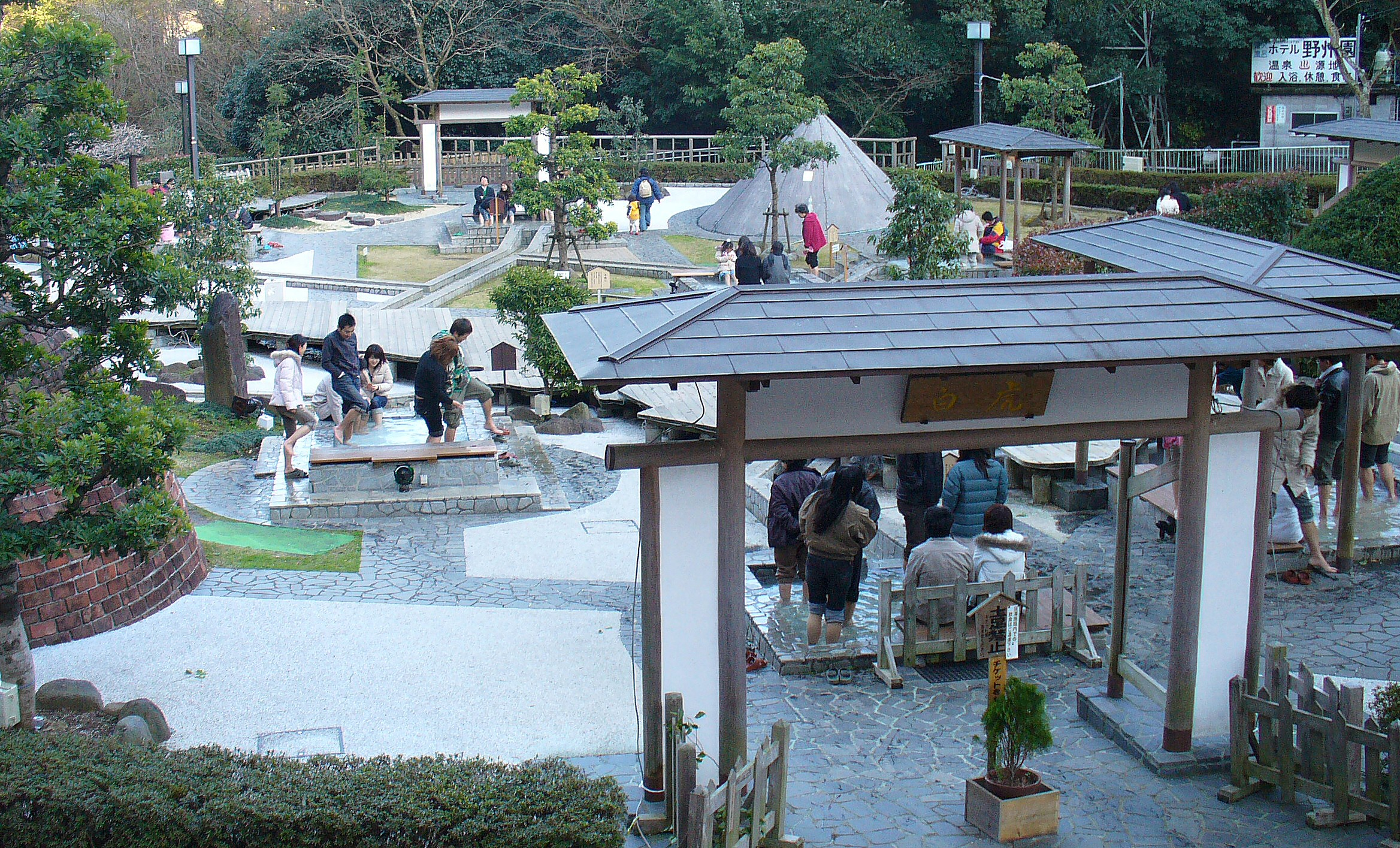 神奈川県湯河原町にある「湯河原温泉万葉公園足湯施設独歩の湯」。